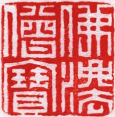 中井敬所作 石印 印面長2.3 白文「仏法僧宝」